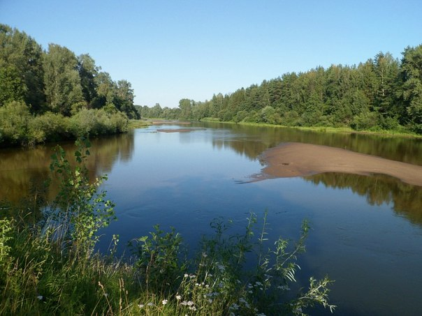 река кильмезь